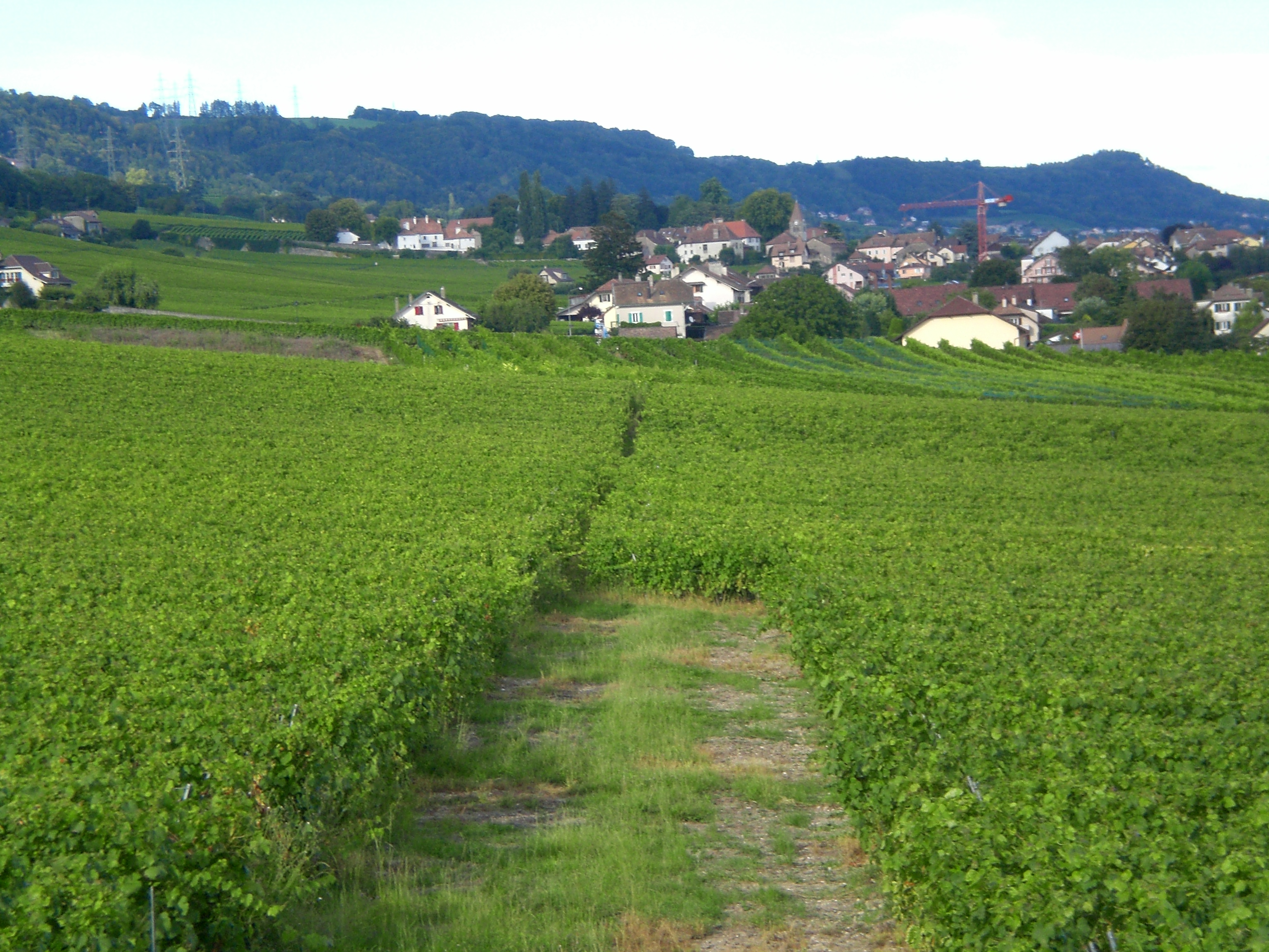 Vue sur le village de Vinzel et les vignes